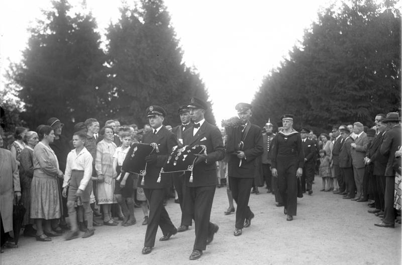 Die feierliche Beisetzung der sterblichen Ueberreste des berühmten Tsingtaufliegers Plüschow und seiners Begleiters Dreblow, welche in Südamerika tödlich verunglückten, auf dem Park-Friedhof in Berlin-Lichterfelde. Die Aschen-Urne Günther Plüschows an der Spitze des Trauerzuges wird zur letzten Ruhe getragen.